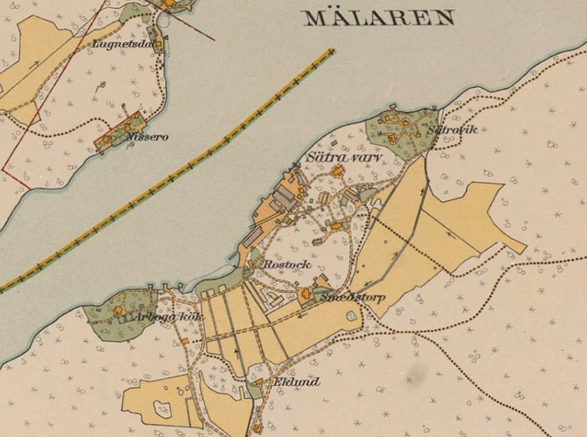 Detaljerad karta över Stockholm med omnejd. Upprättad mellan 1917 och 1934.